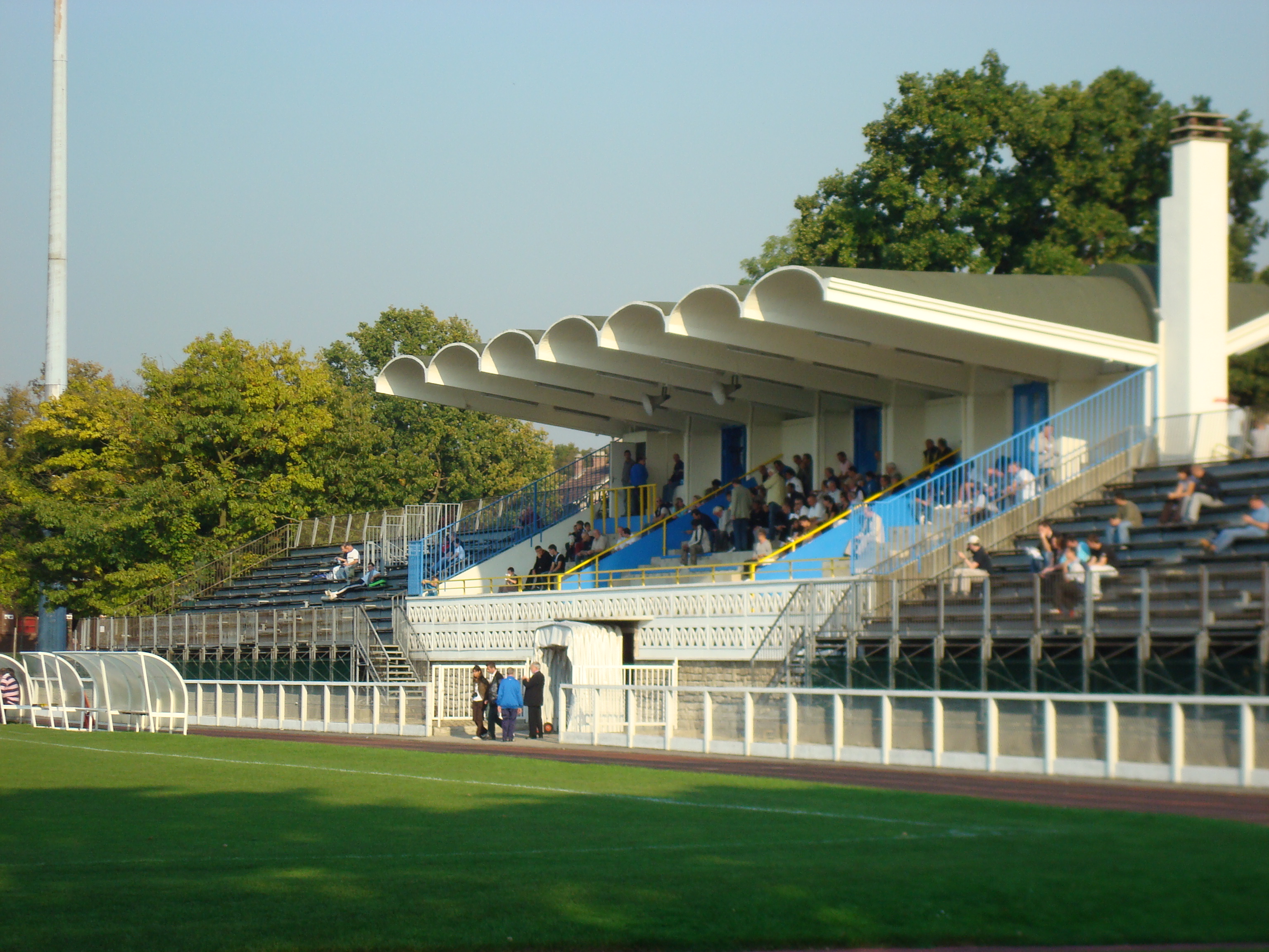 Tribunes en voile mince de béton armé et tribunes métalliques du terrain Roger Quenolle du stade Léo-Lagrange à Poissy.